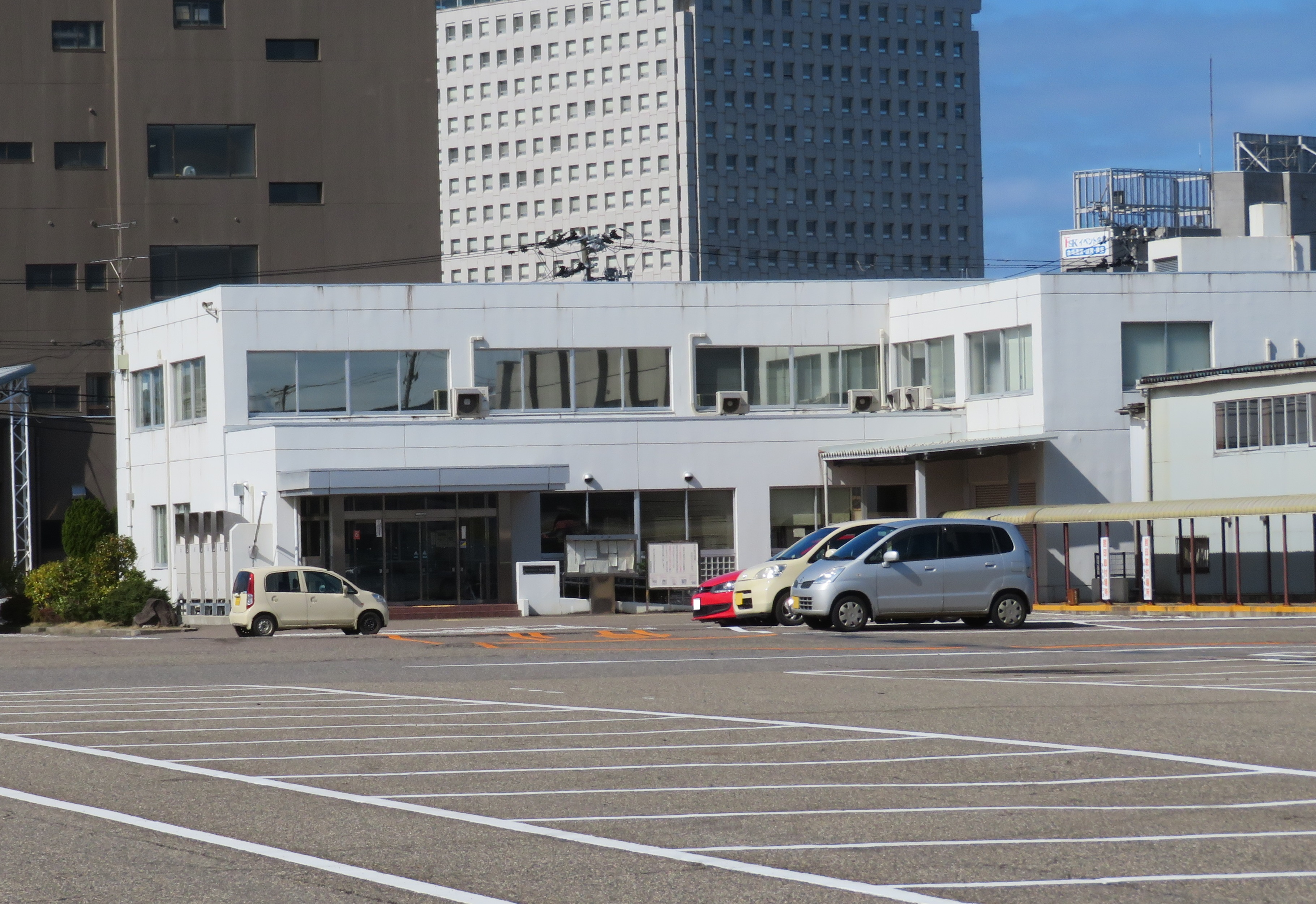 新潟運輸支局庁舎